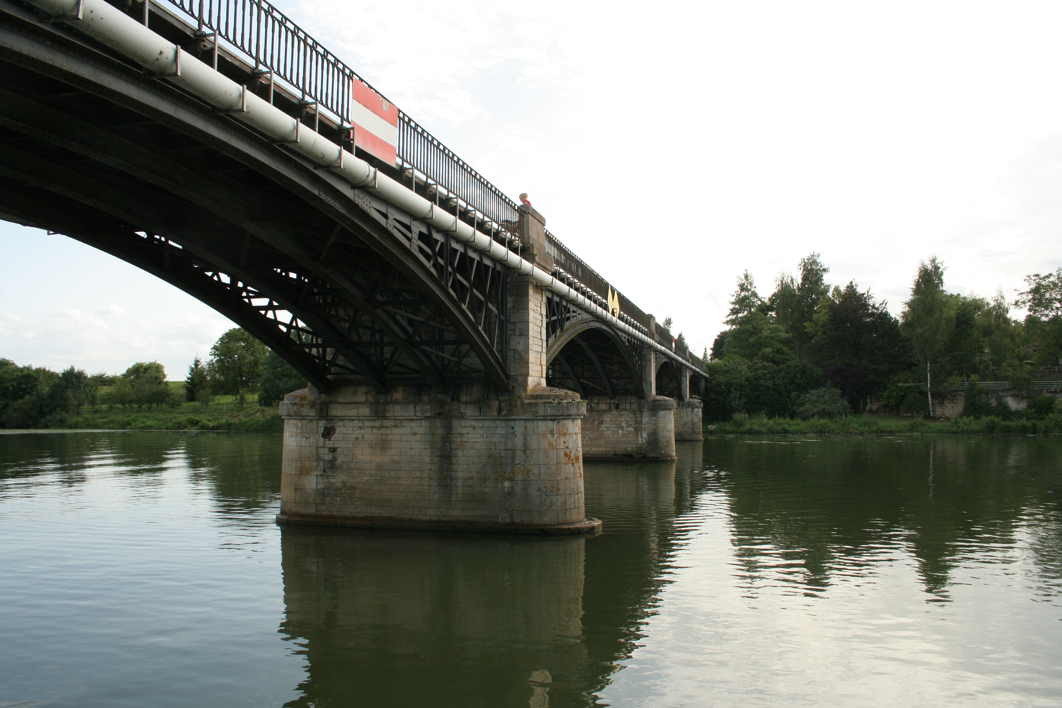 Pont de Prantigny bridge over Saône river (Montureux-et-Prantigny) France